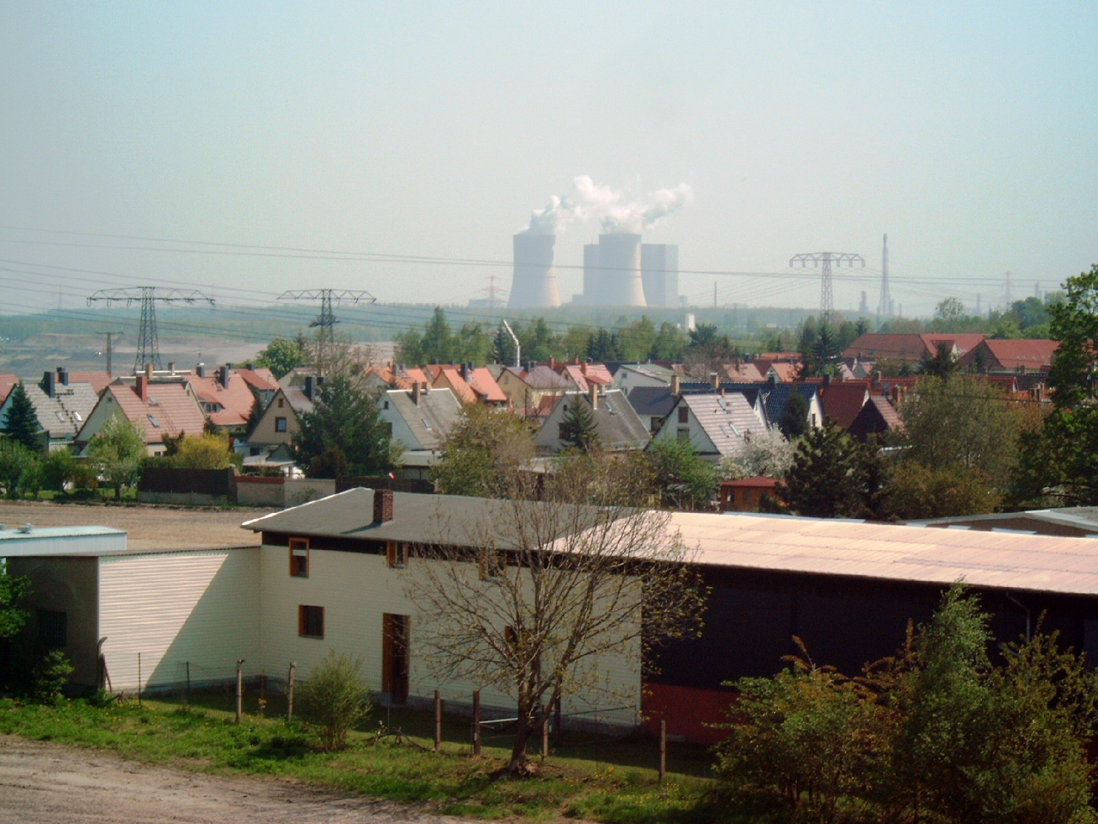 Stadtansicht Zwenkau mit Braunkohlenkraftwerk Lippendorf-Böhlen im Hintergrund.